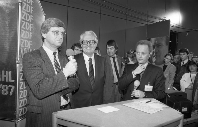 25.1.1987 Bundestagswahl Wahlparty der SPD im Erich-Ollenhauer-Haus Fernseh-Interviews mit Hans-Jochen Vogel, Kanzlerkandidat Johannes Rau und Peter Glotz